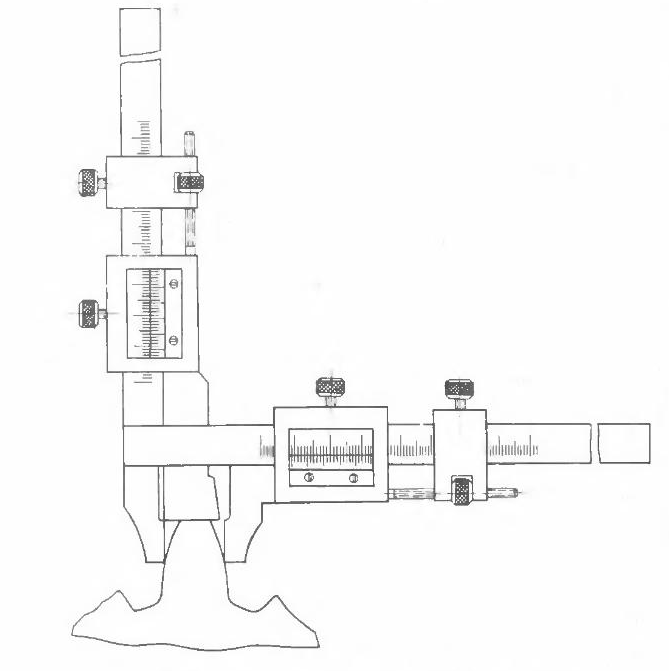 Ձողաատամնաչափիչի գծագիր